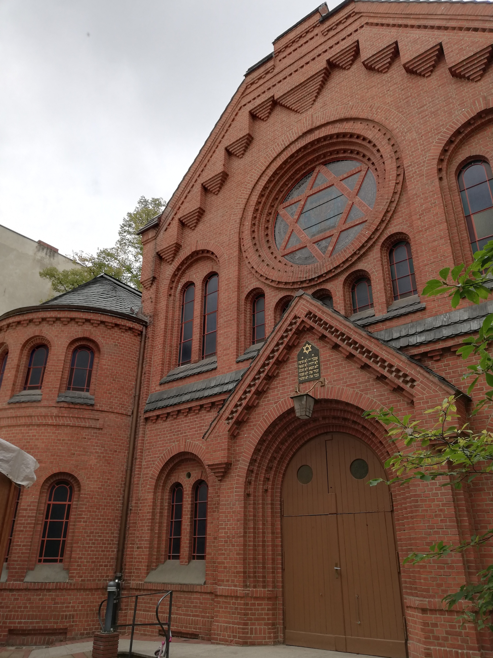 Synagogue in the Pestalozzistraße (Berlin)